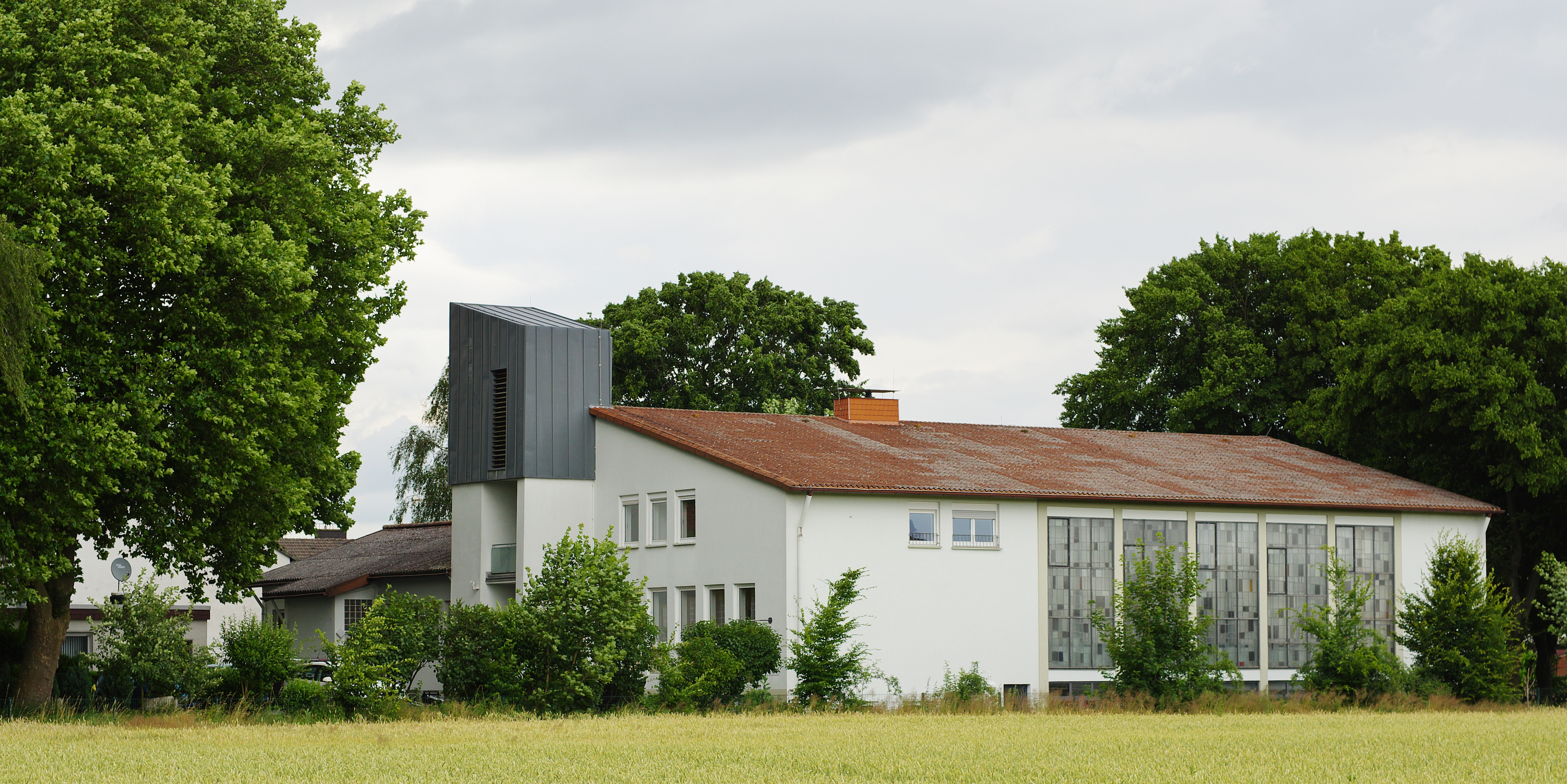 Das Bethaus der liberalen Jüdischen Gemeinde «haKochaw» für den Kreis Unna e.V. ist seit 2012 vollwertige Synagoge. Ehemals ein evangelisches Gemeindezentrum (Bodelschwinghhaus).